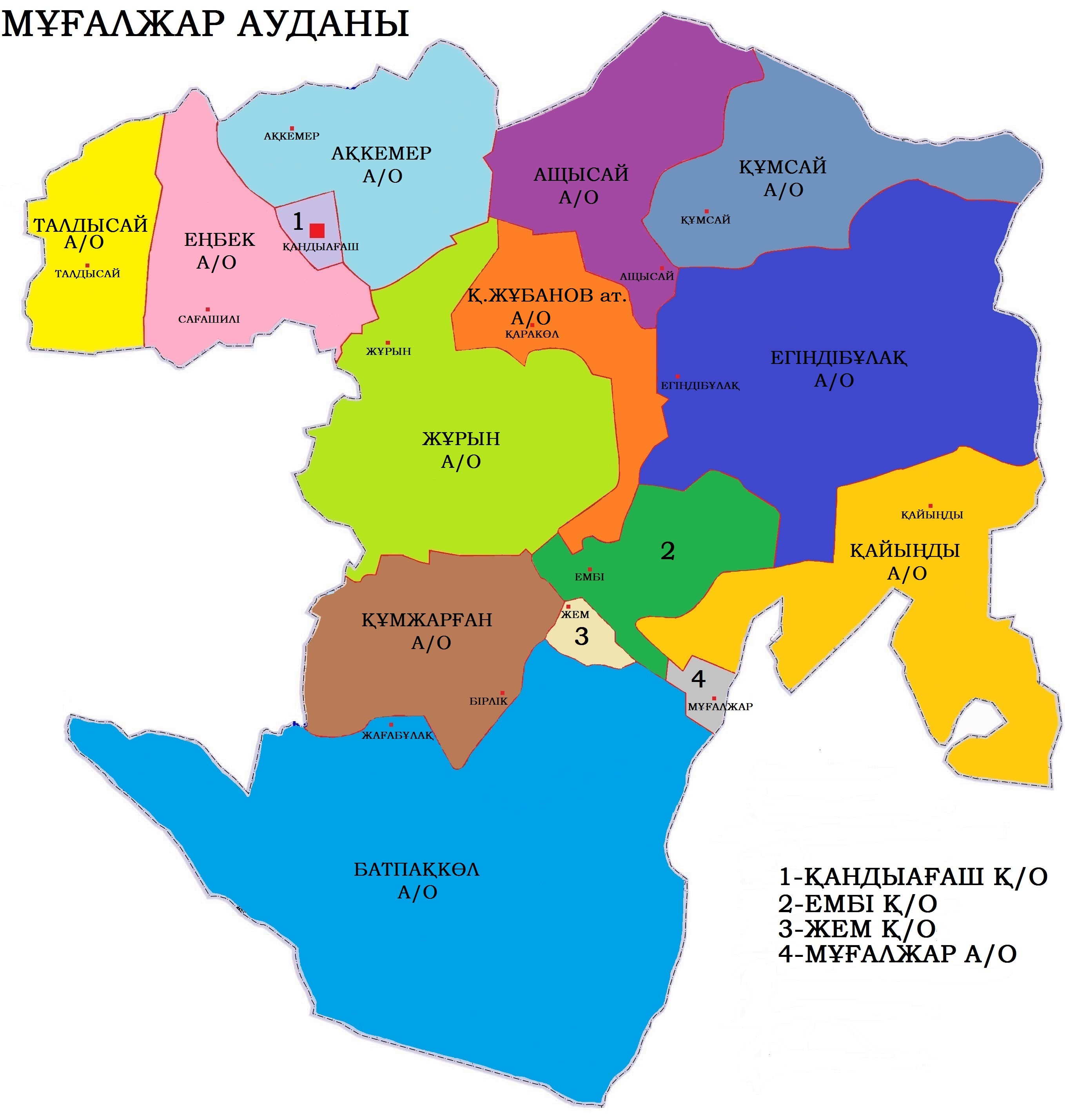 Мұғалжар ауданының әкімшілік бөлінісі